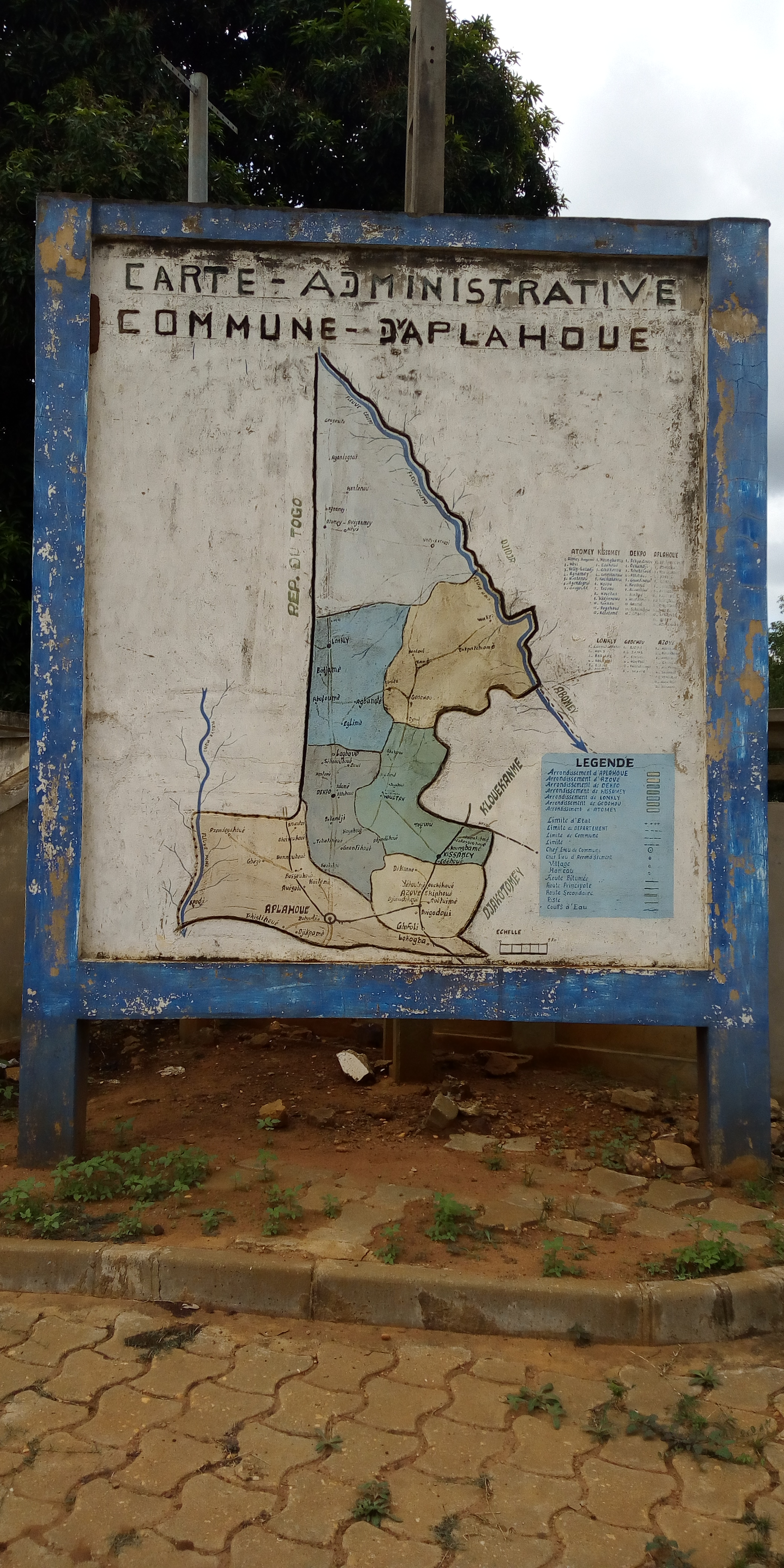 CARTE ADMINISTRATIVE APLAHOUE